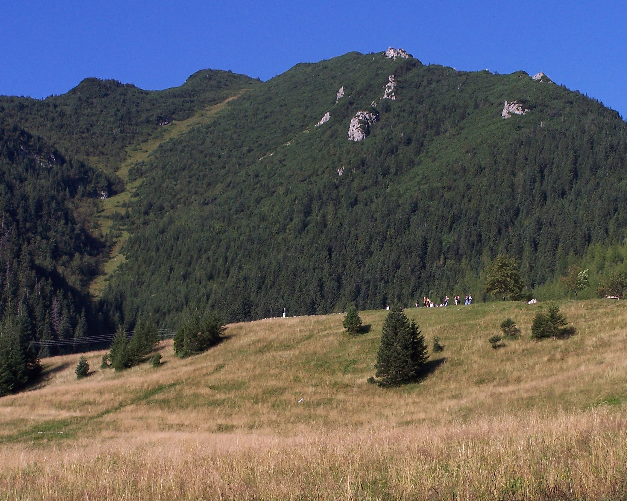 Suchy Żleb Kalacki